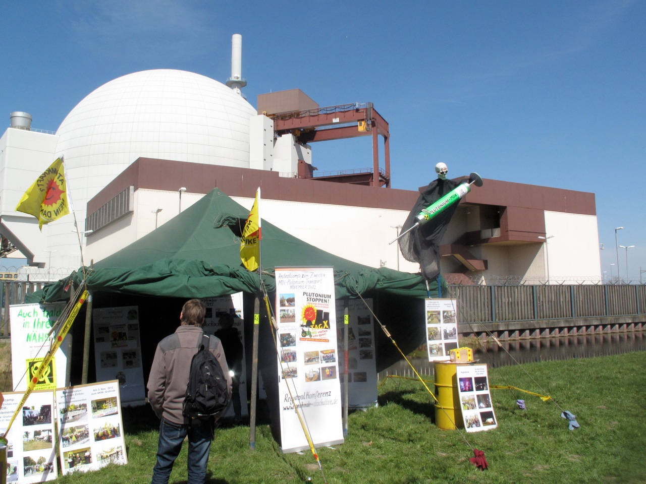 Protest- und Kulturmeile rund um das AKW Brokdorf. Brokdorf abschalten – sofort!